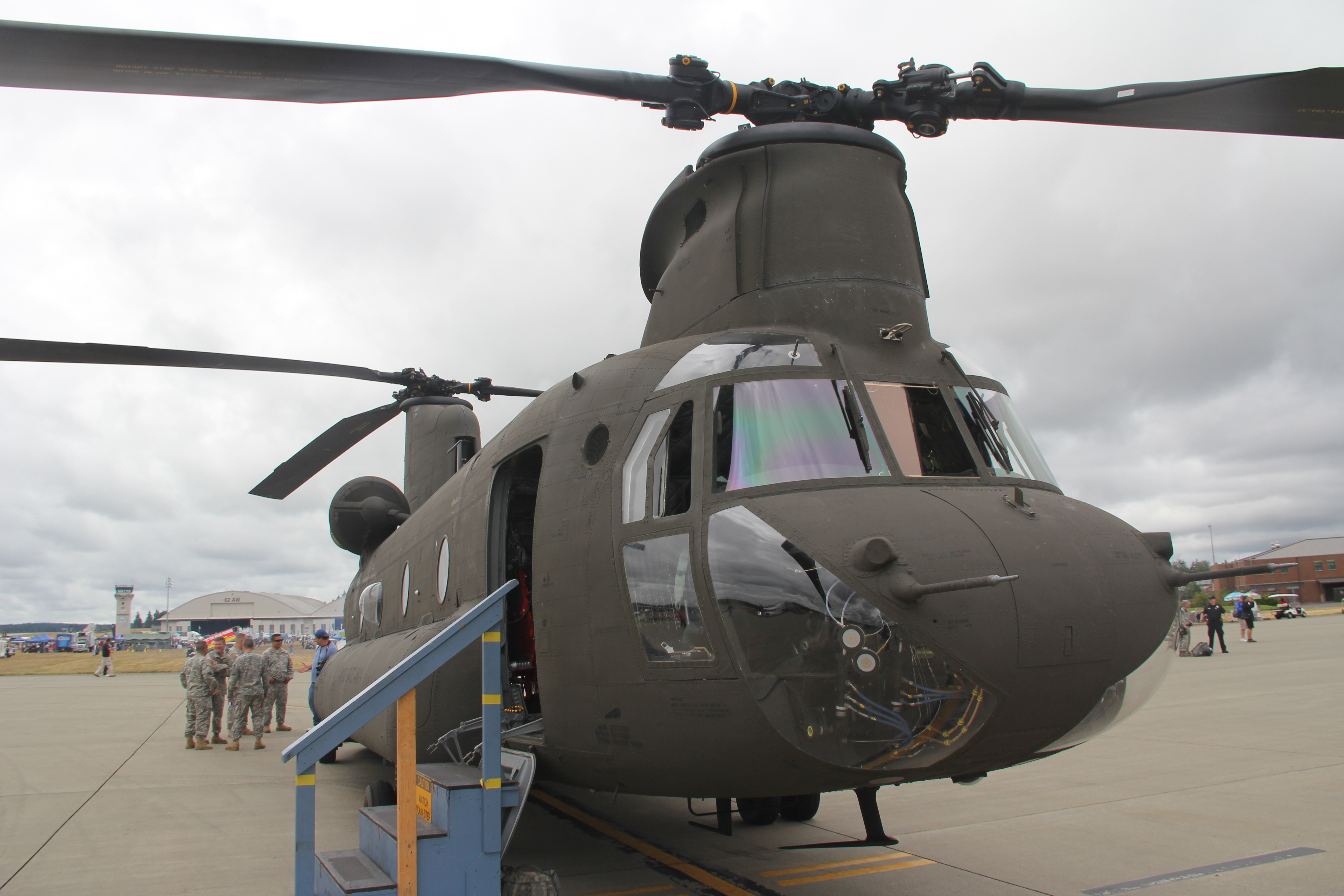 Boeing CH-47 Chinook